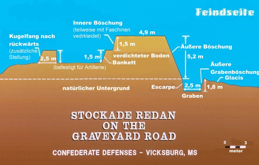 Stockade Redan Detail defenses l (german)